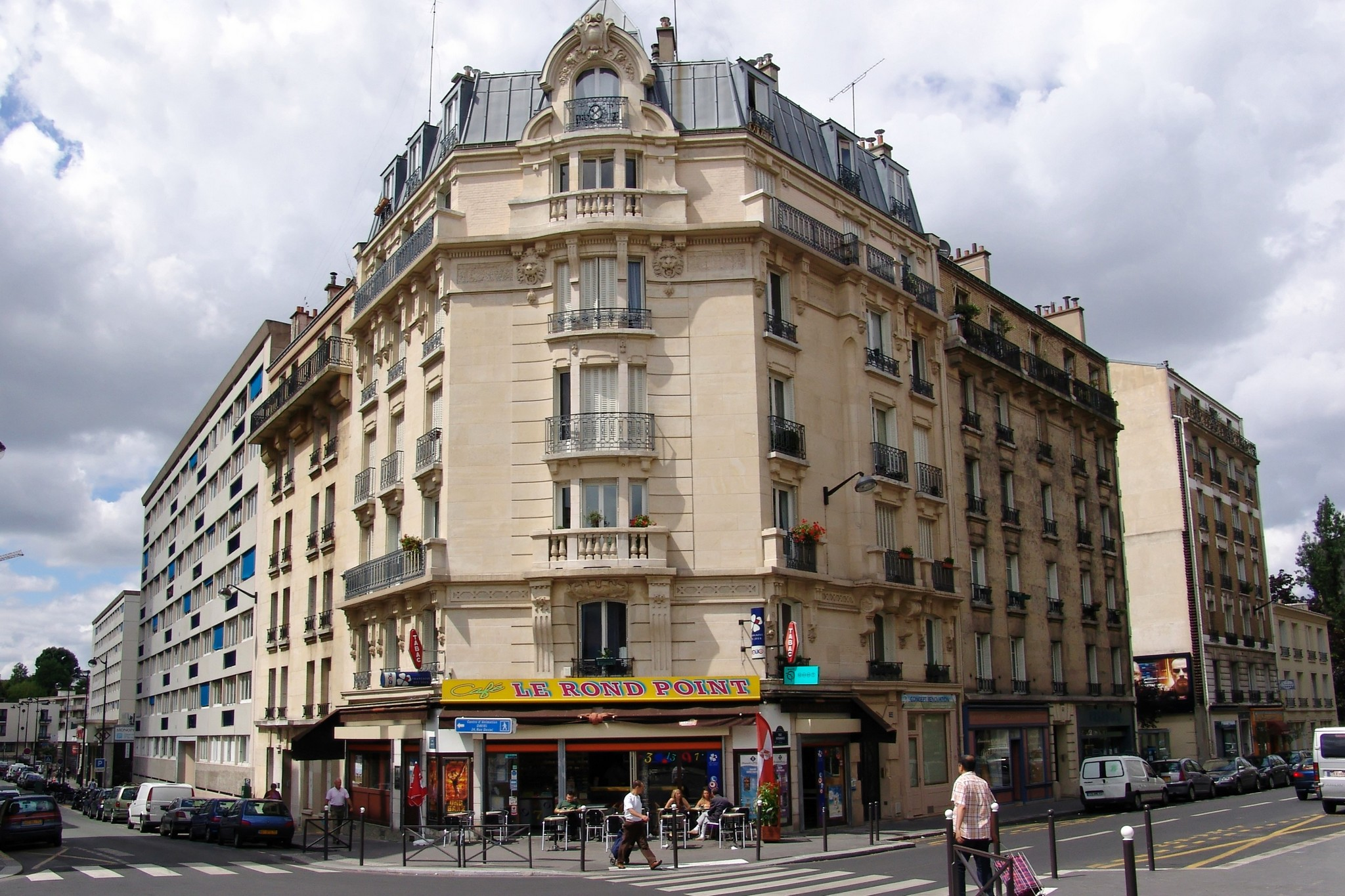 Immeuble situé à l'angle de la rue Daviel (Paris 13 ième)